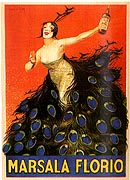 Poster pubblicitario